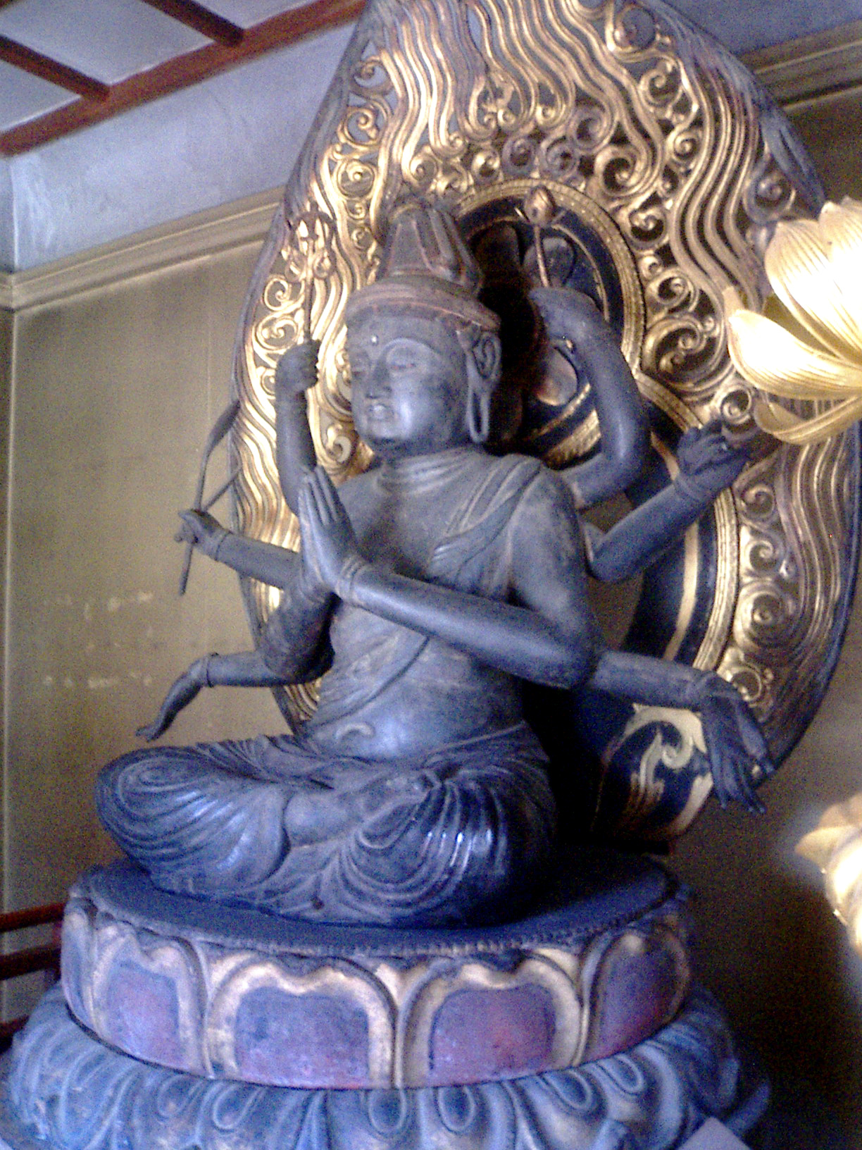 不空羂索観音 坐像 ： 所蔵（法蓮寺 - 日本国香川県三豊市）、重要文化財